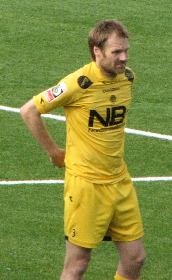 Erik Hoftun under oppstillingen til Bodø/Glimt-Sogndal